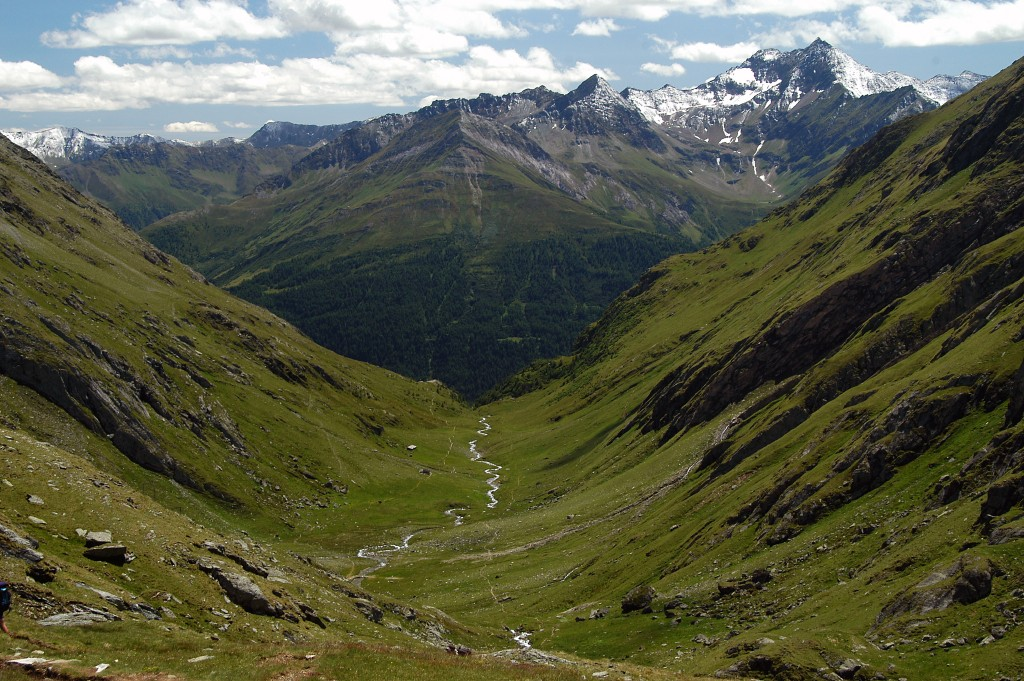 Blick von der Eisseehütte aufs Timmeltal. selbst geknipst. GNU-FDL.